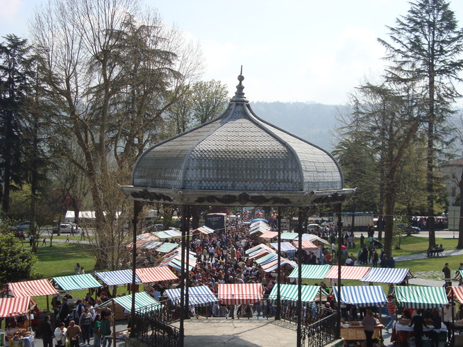 Vista del Mercadón del Primer Flor de Grado, Asturias, España desde el parque de arriba